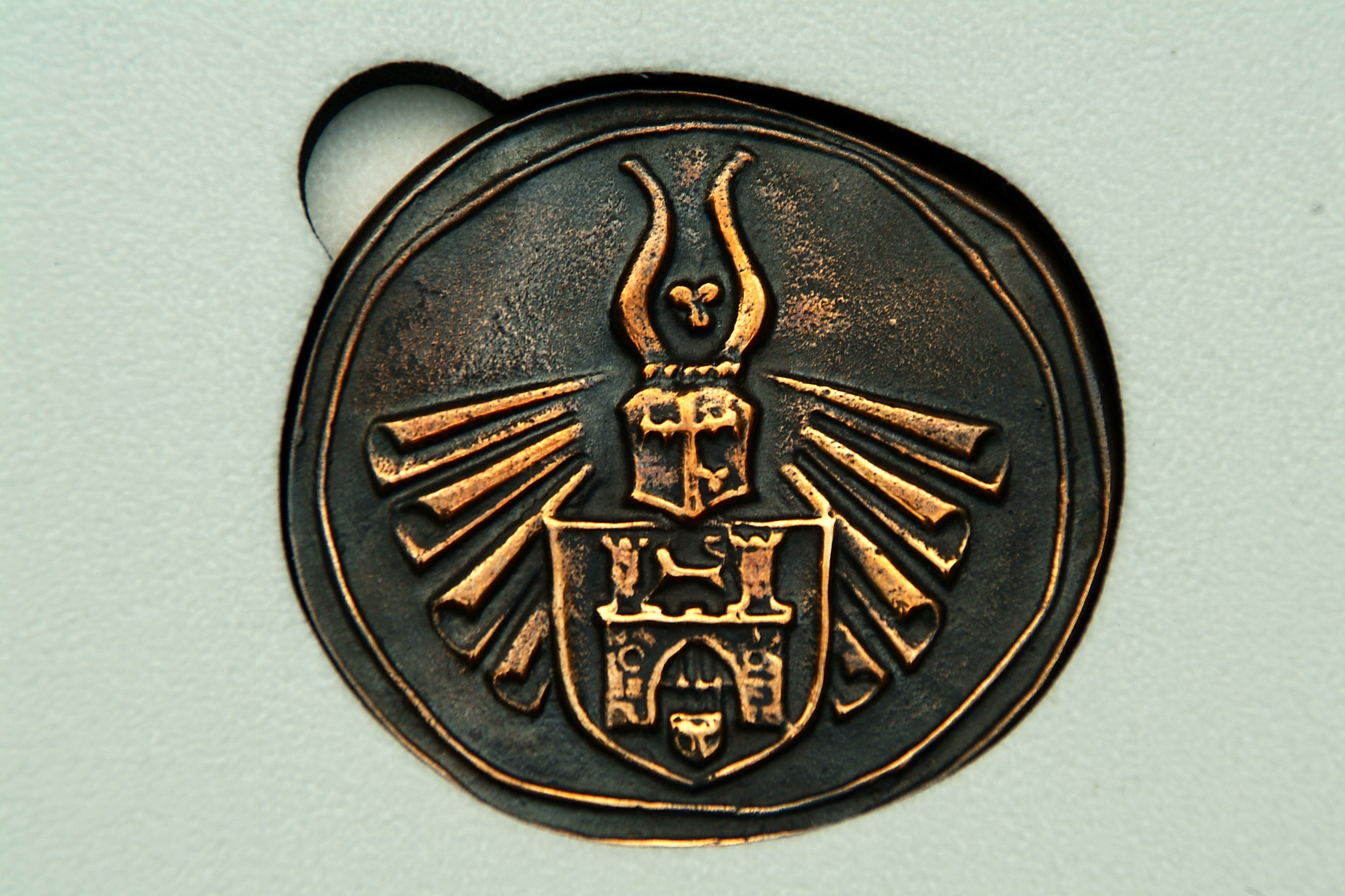 Die eine Seite der Stadtplakette Hannover, verliehen an die Künstlerin Ulrike Enders "... für 40 Jahre Verdienste um die Kunst- und Kulturstadt Hannover ...", zeigt das Wappen der niedersächsischen Landeshauptstadt mit dem dreiblättrigen Kleeblatt ...